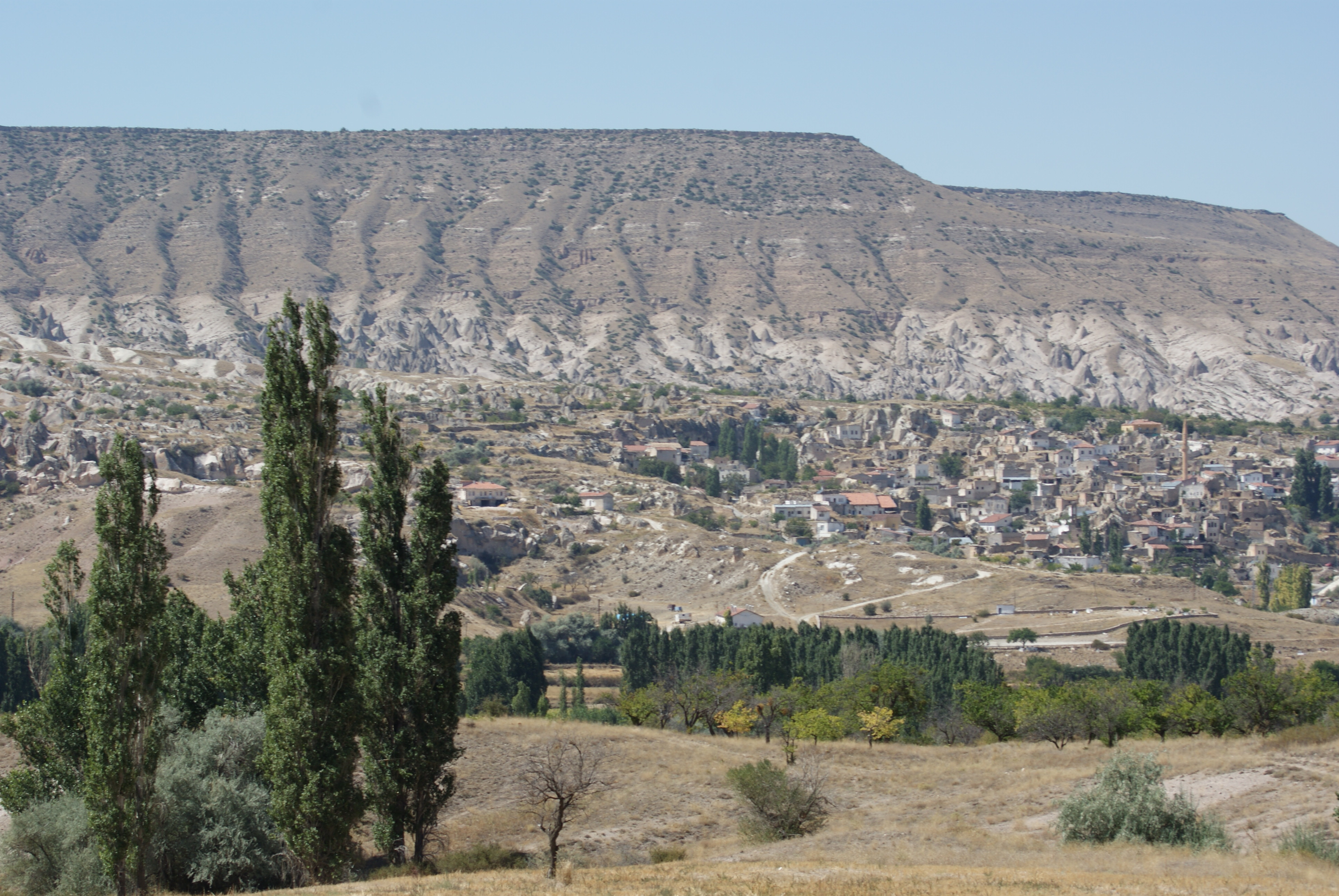 Erdoğan Aslan